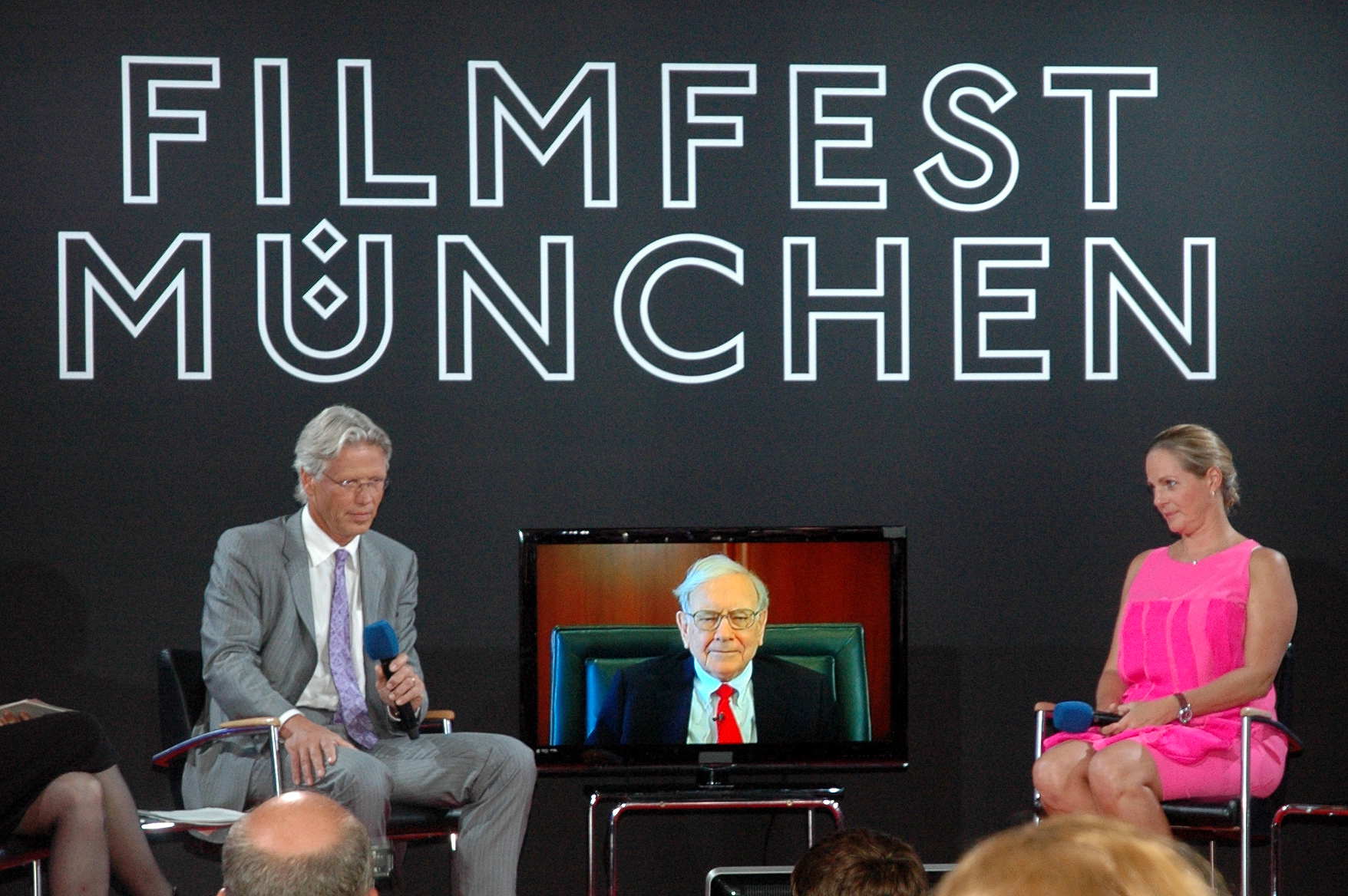 Stephan Goetz (li.), Warren Buffett (live zugeschaltet) und Baronin Ariane de Rothschild bei einer Podiumsdiskussion auf dem Filmfest 2012 in München